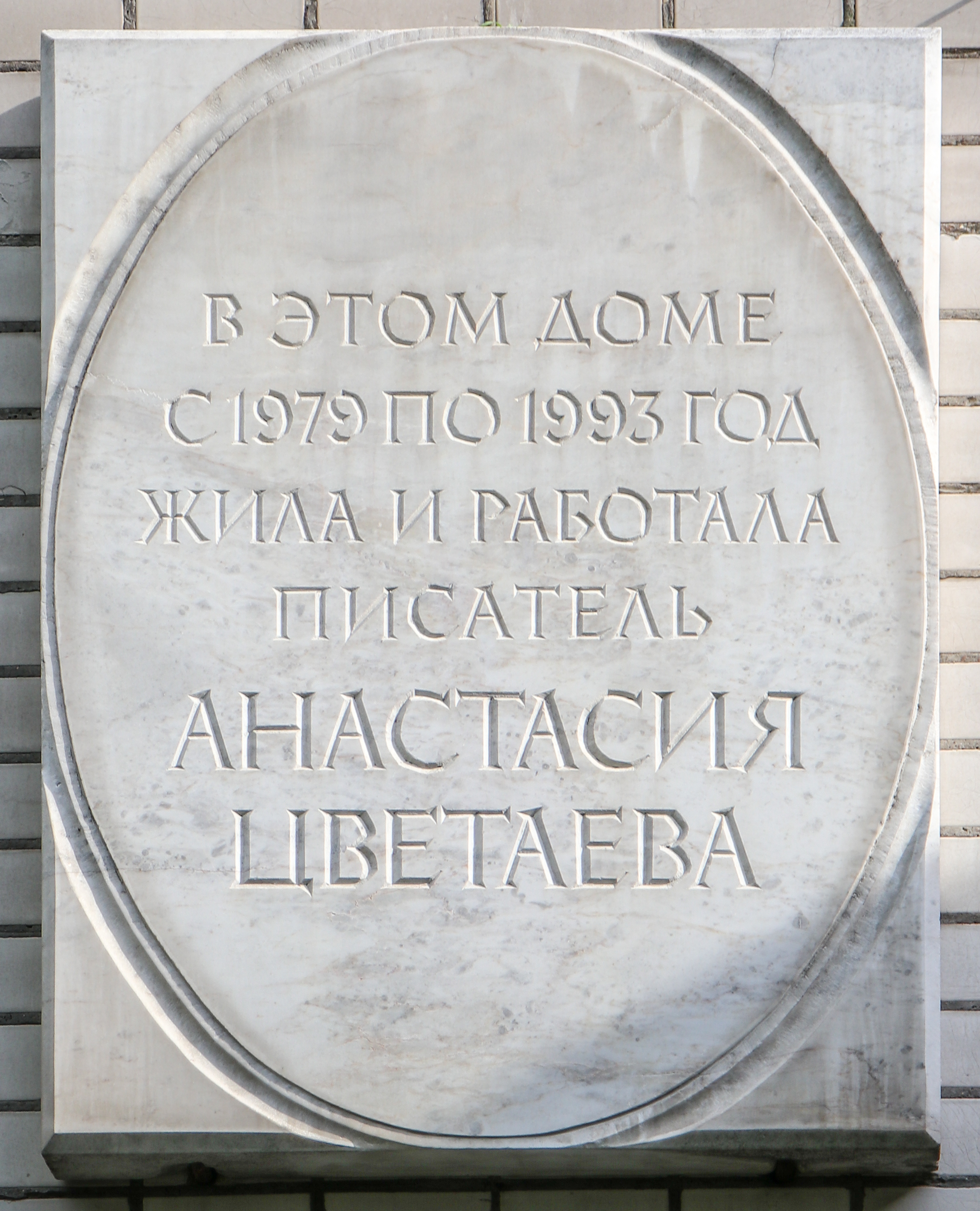 Мемориальная доска писательнице Анастасии Цветаевой (1894—1993). Доска из мрамора, была установлена в 1994 году на фасаде панельного жилого дома (Большая Спасская улица, 8).